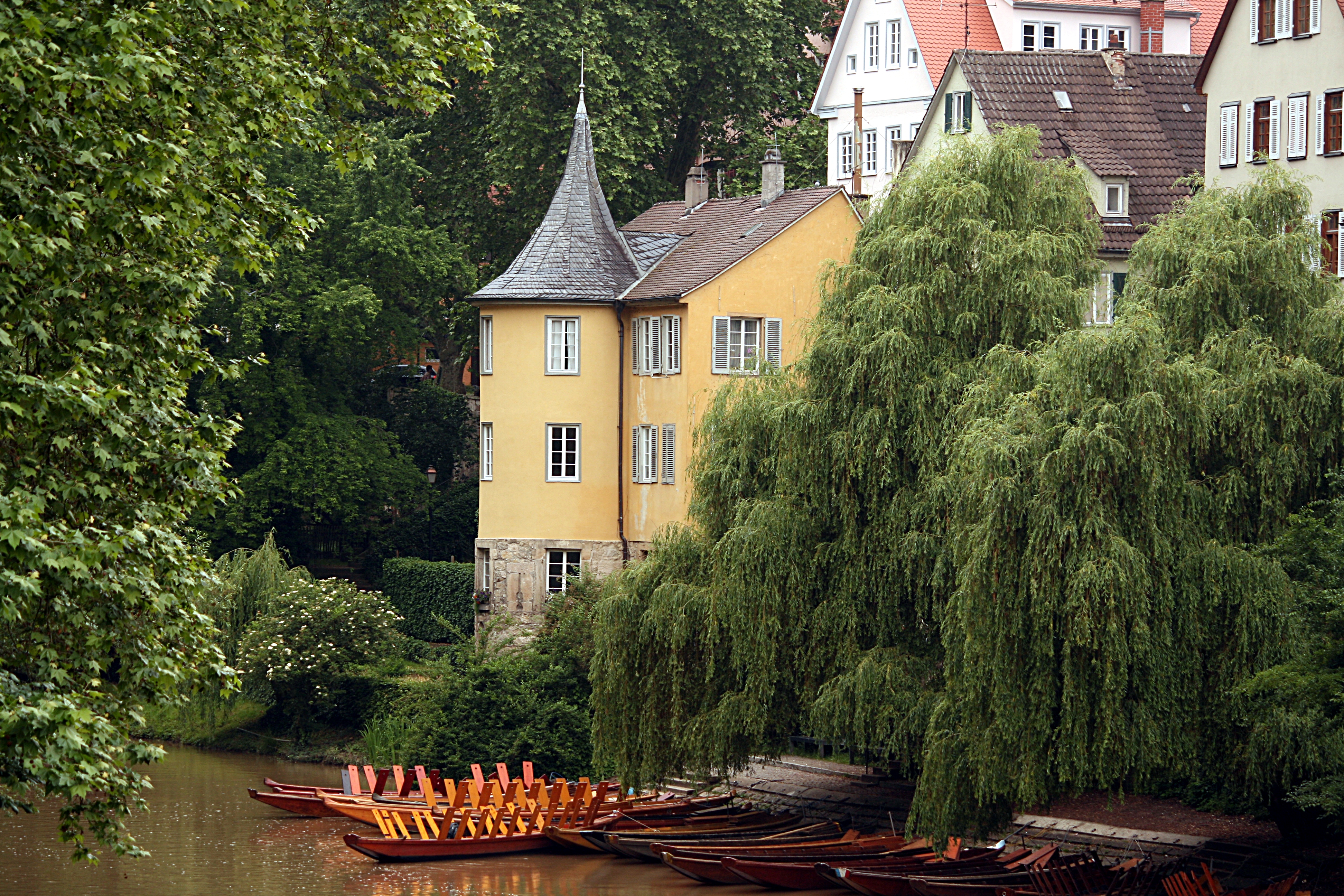 Tübingen,_Neckar,_Hölderlinturm